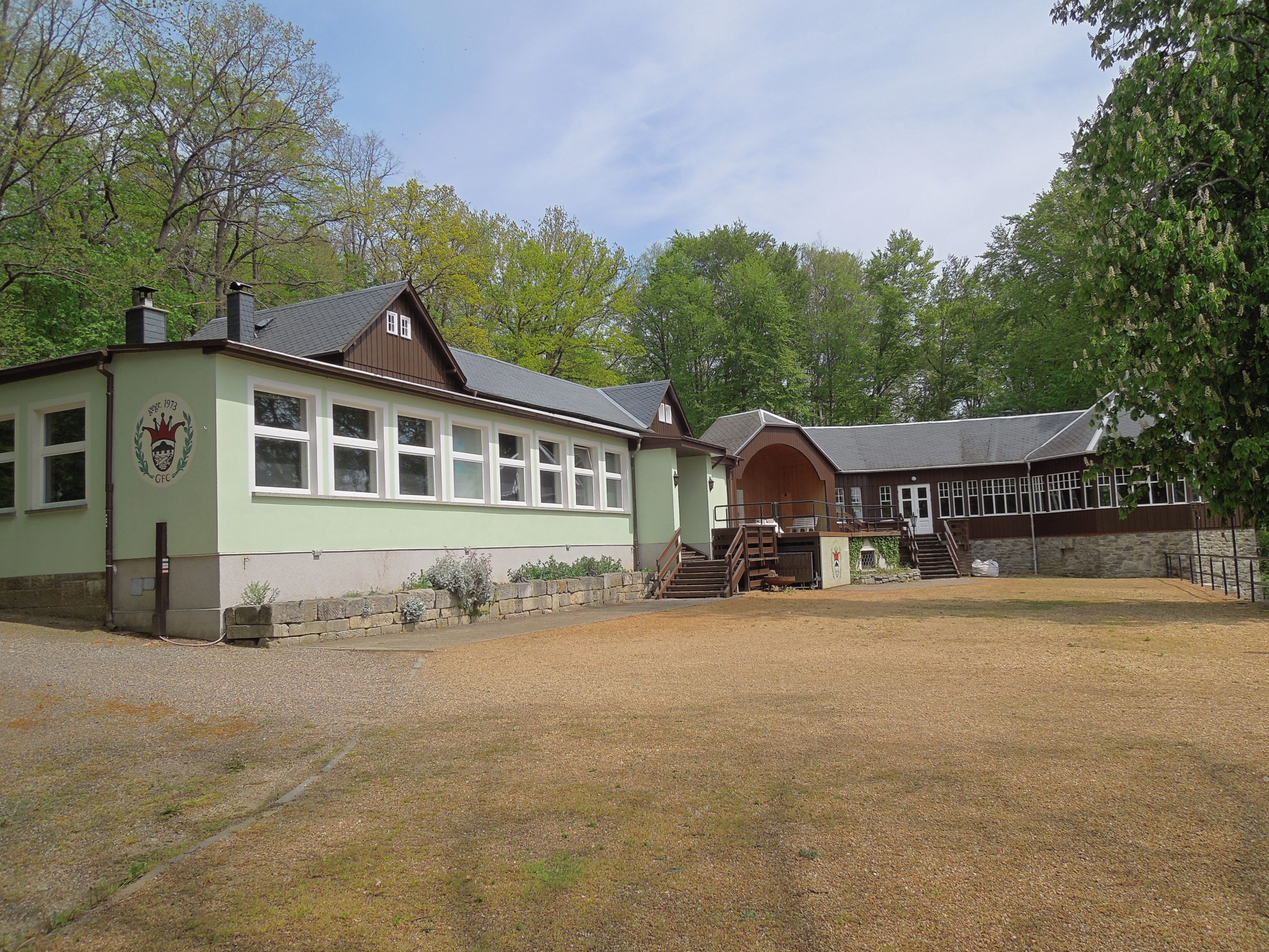 Hutbergbaude in Großschönau